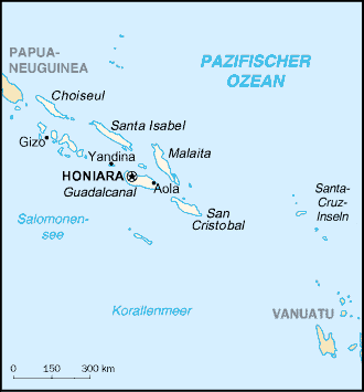 Karte der Salomonen